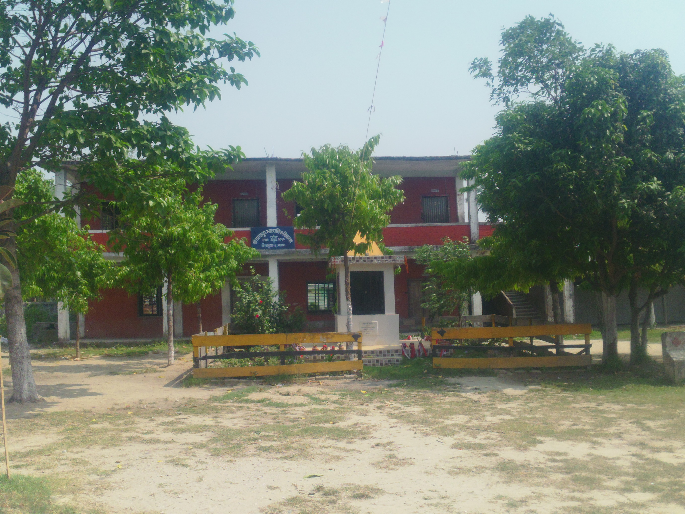 नेपाली: चम्मापुर स्कुलको भवन 1